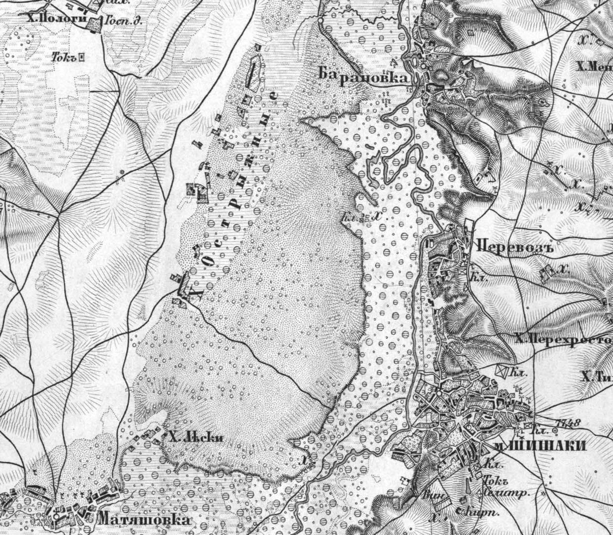 Триверстова мапа Ф.Ф.Шуберта, ХІХст. Маштаб 1см = 1260 м або 1 дюйм = 3 версти.